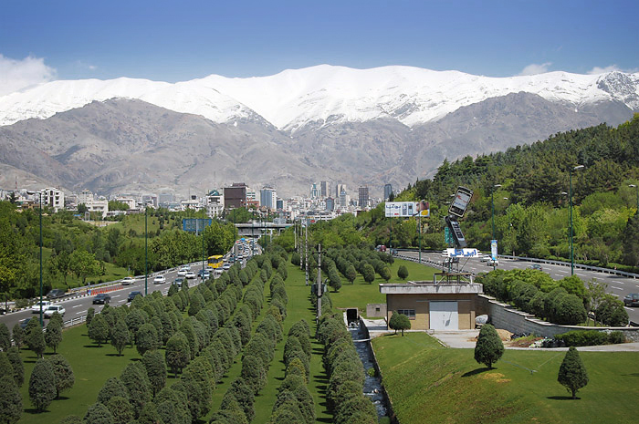 نمایی از کوه‌های توچال از بزرگراه مدرس تهران